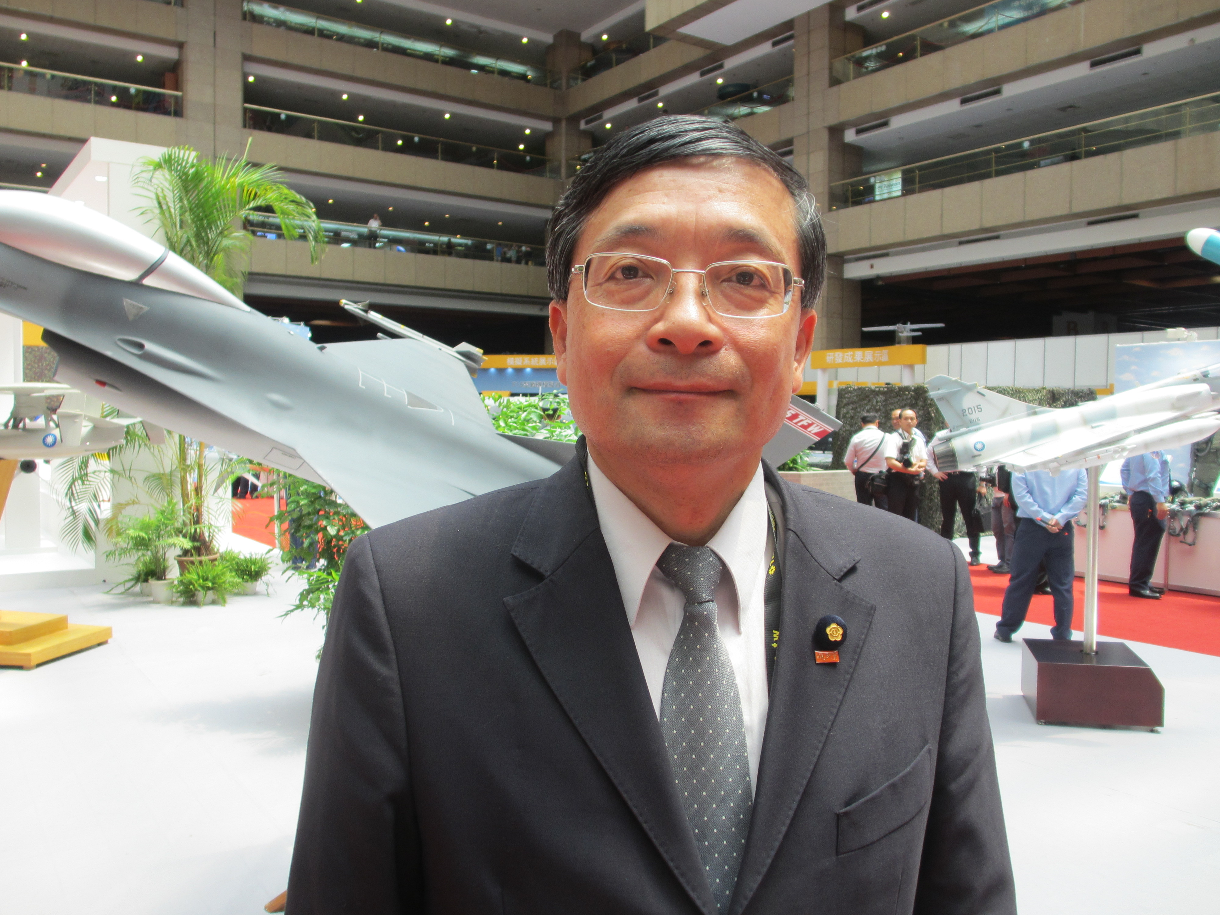 中文（台灣）: 台灣在野黨親民黨立委李桐豪